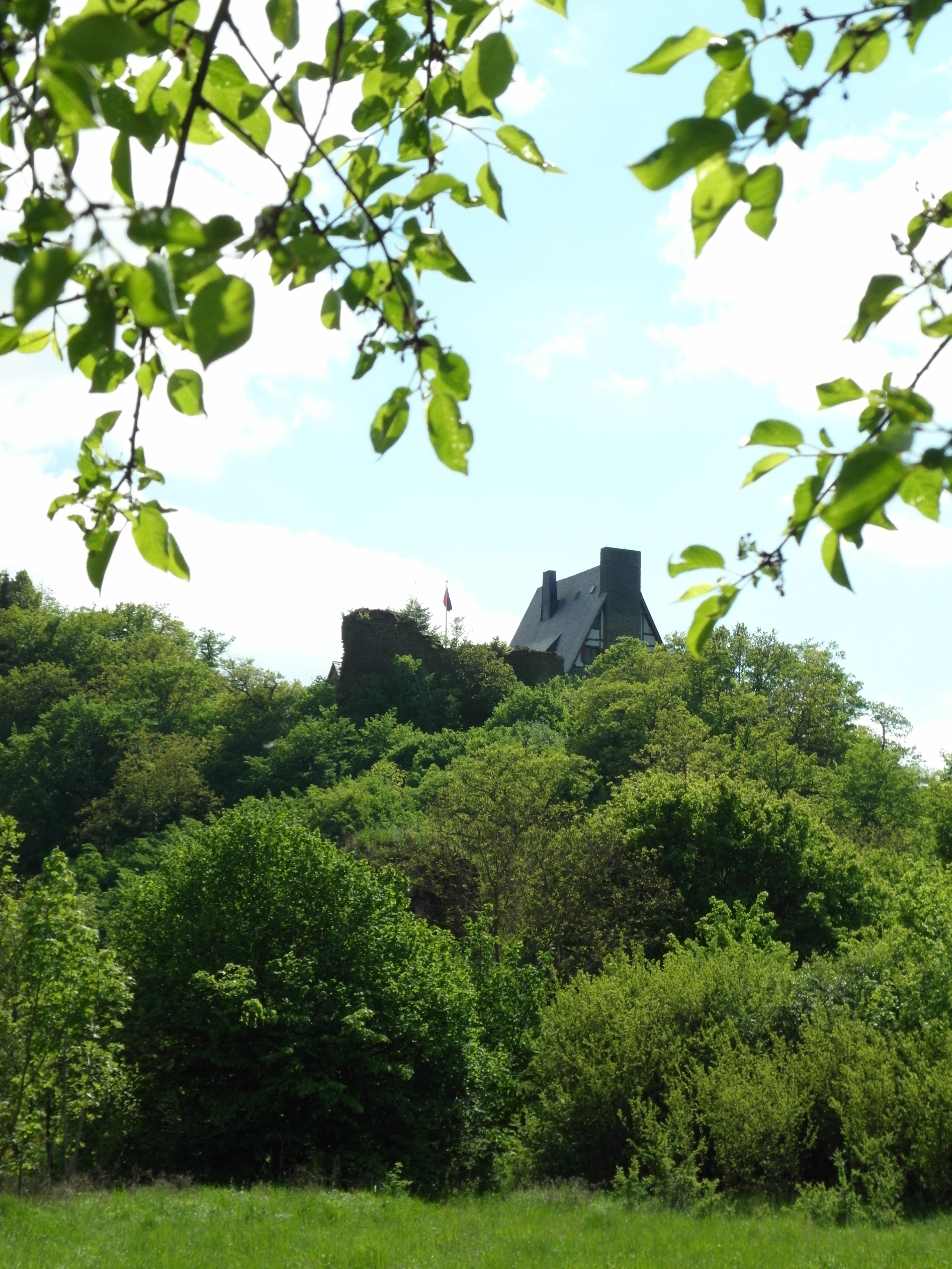 Burg Waldeck (Hunsrück); Oberburg von der Unterburg aus gesehen